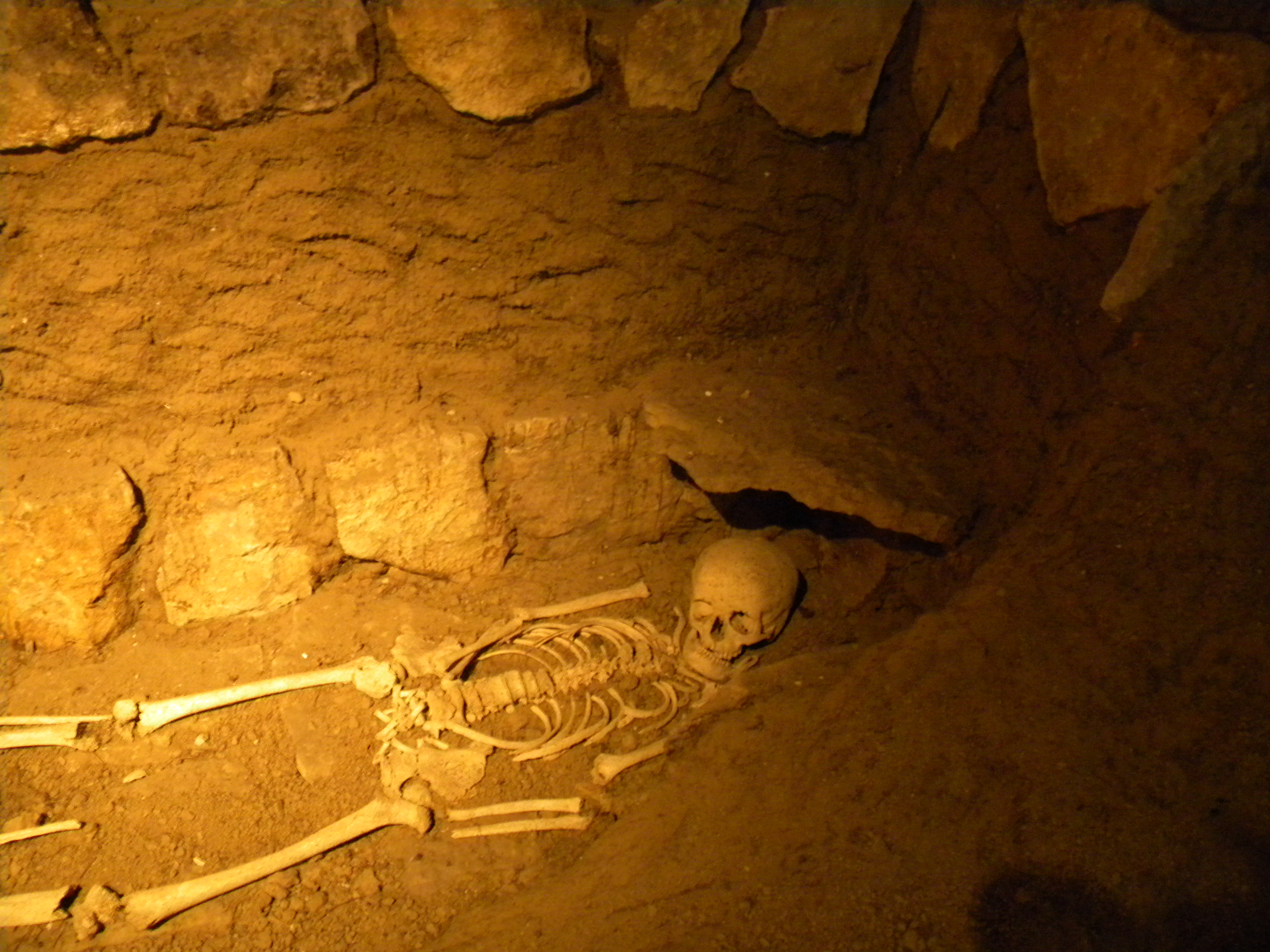 Arcenant tombe mérovingienne